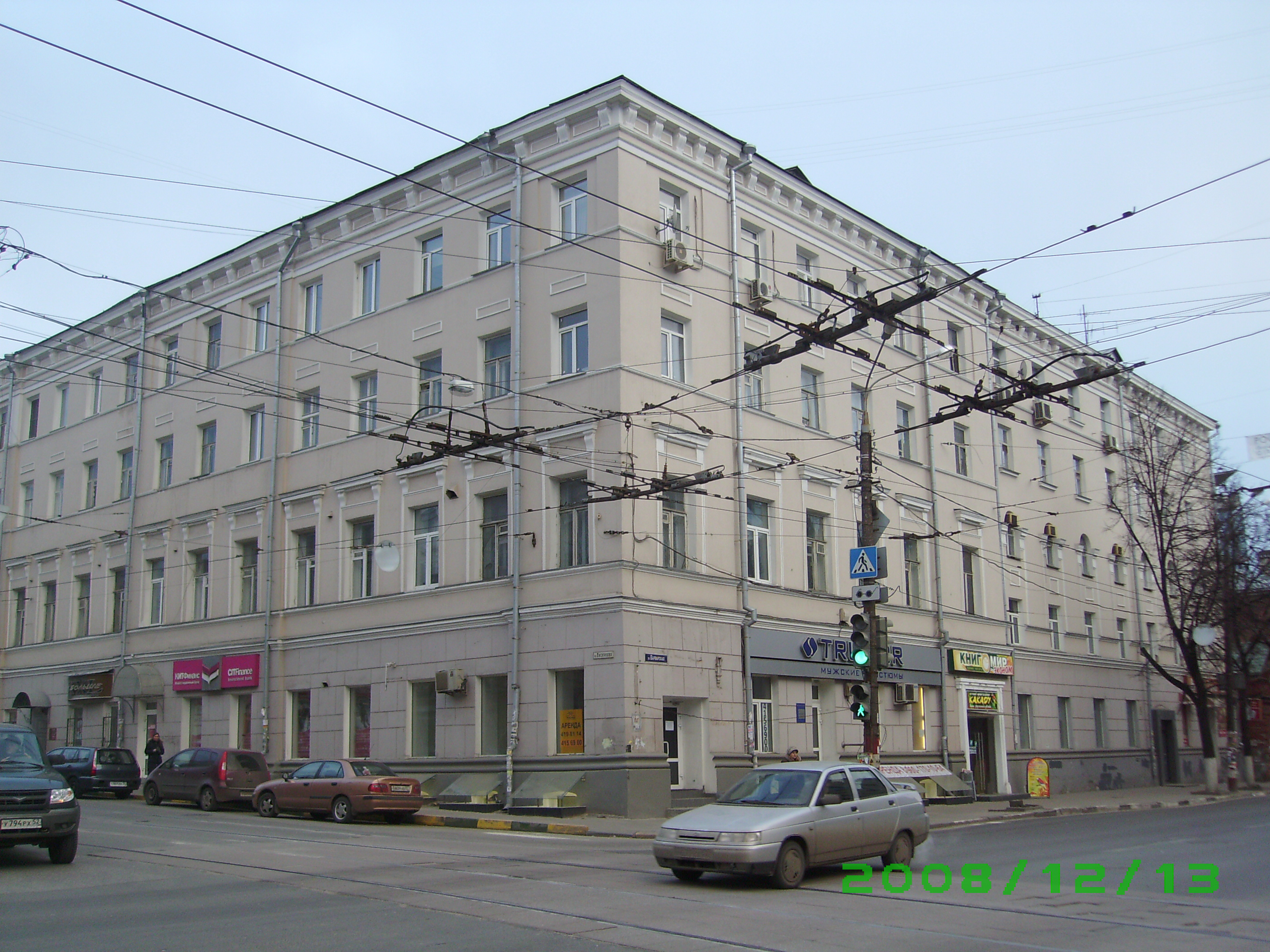 Варварская 10, Нижний Новгород.